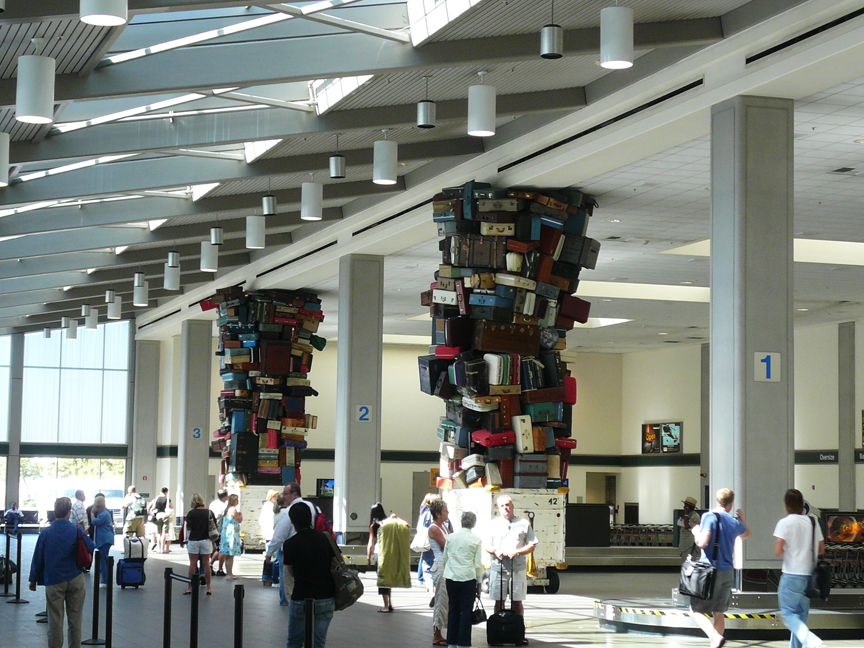 Sacramento Airport, sculpture